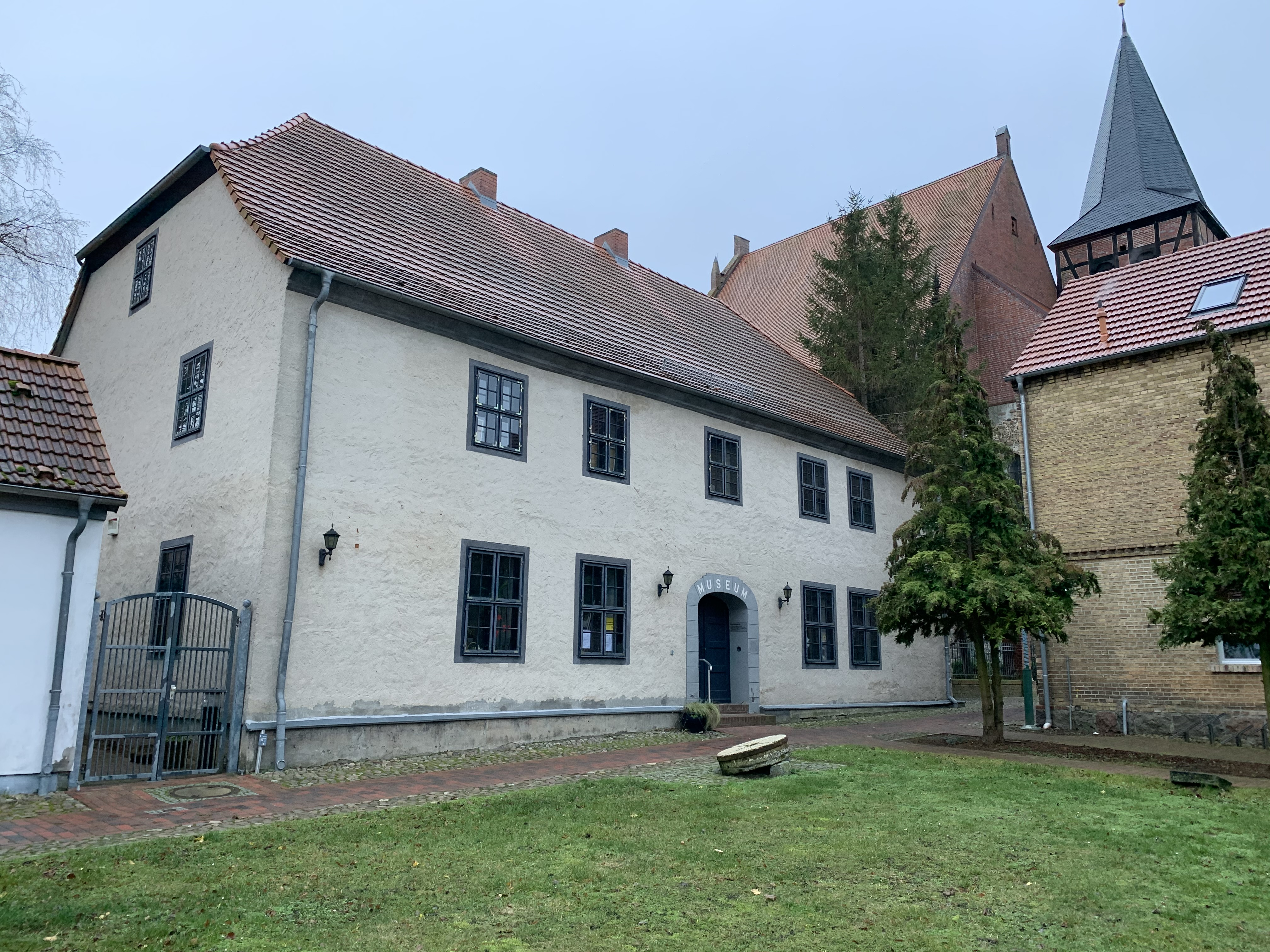 Heimatmuseum und Schälchenstein in Strasburg (Uckermark) in Mecklenburg-Vorpommern